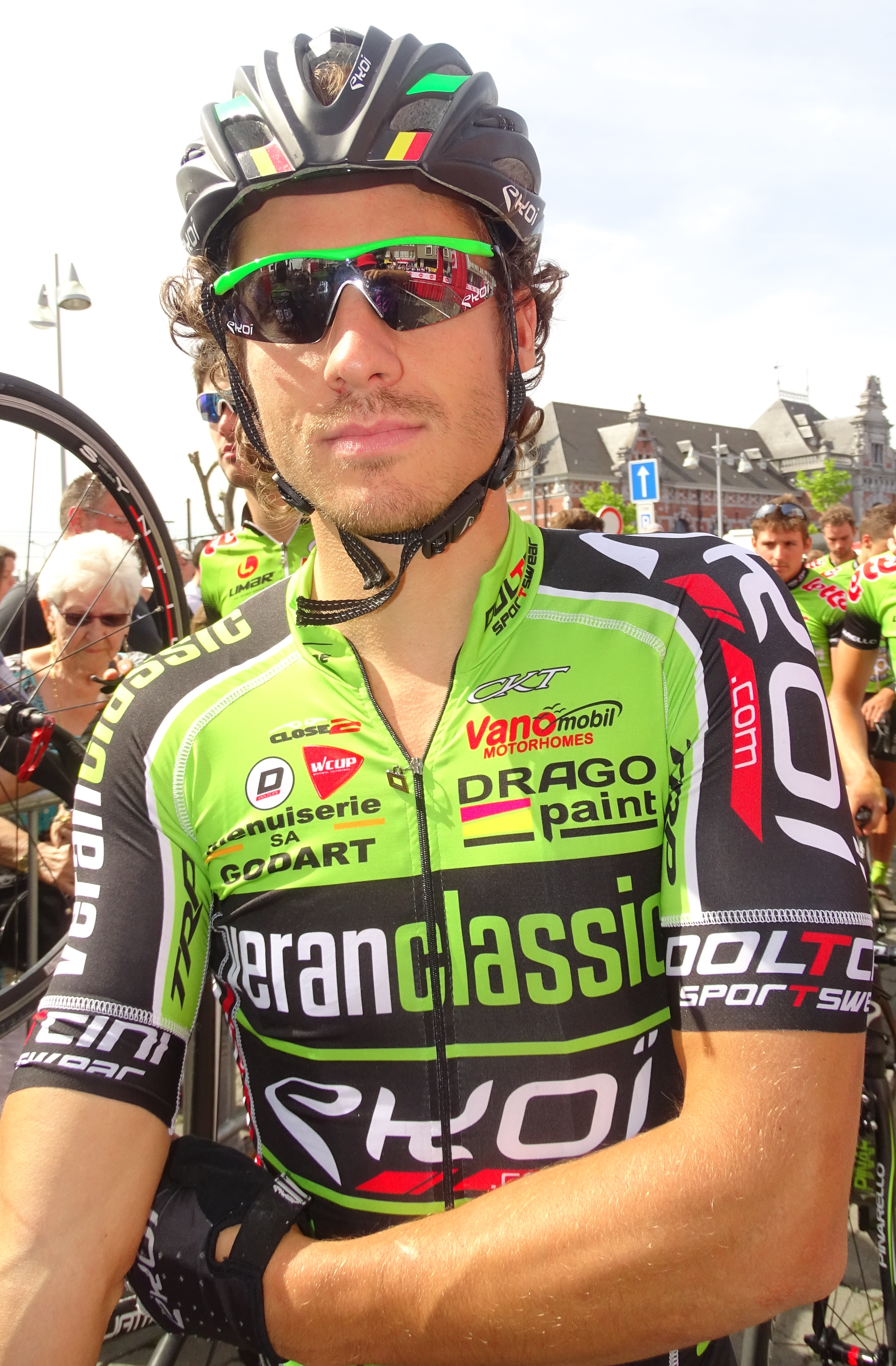 Reportage réalisé le mercredi 22 juillet à l'occasion du départ du Grand Prix Pino Cerami 2015 à Saint-Ghislain, Belgique.